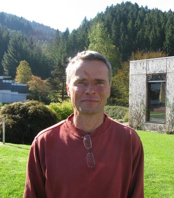 Foto di Michael Weiss